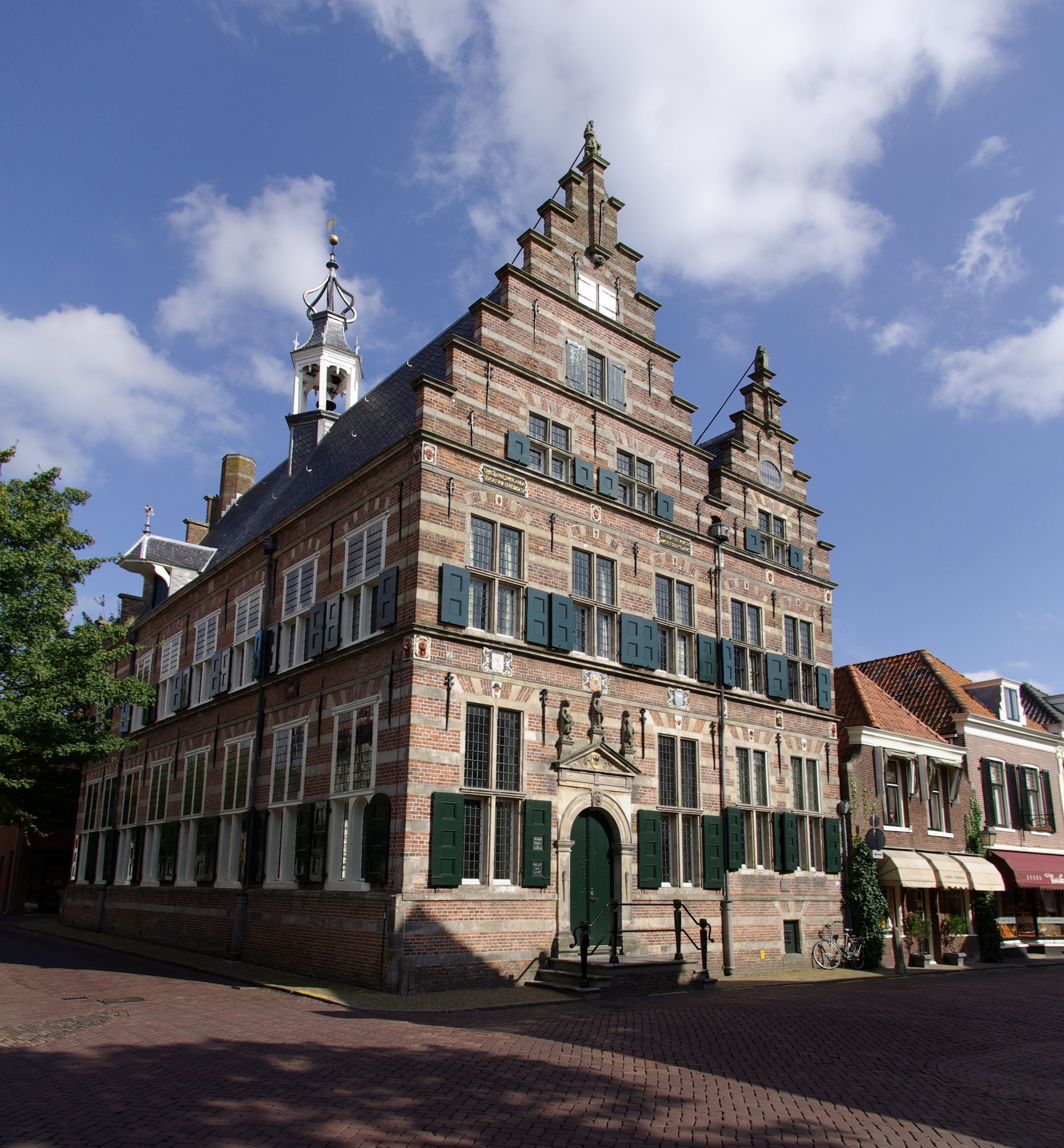 Das Rathaus von Naarden, Niederlande